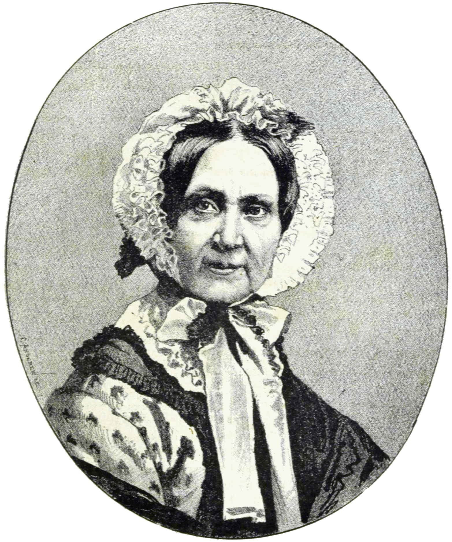 Sophie Archduchess of Austria (Birth name: Princess Sophie of Bavaria; 1805–1872) Ihre kaiserliche Hoheit die durchlauchtigste Frau Erzherzogin Sophie